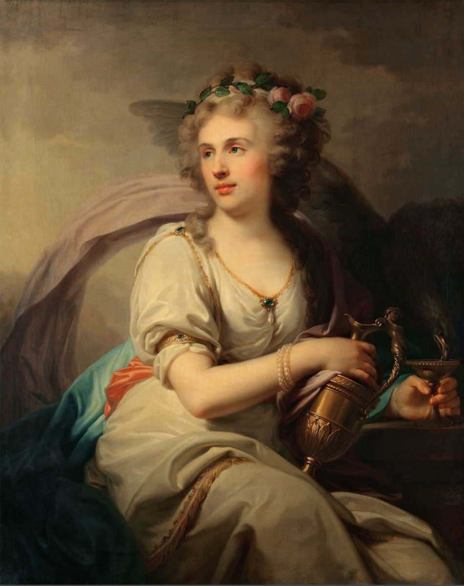 И.-Б. Лампи-старший. Портрет княгини Е.Ф. Долгорукой в виде Гебы.